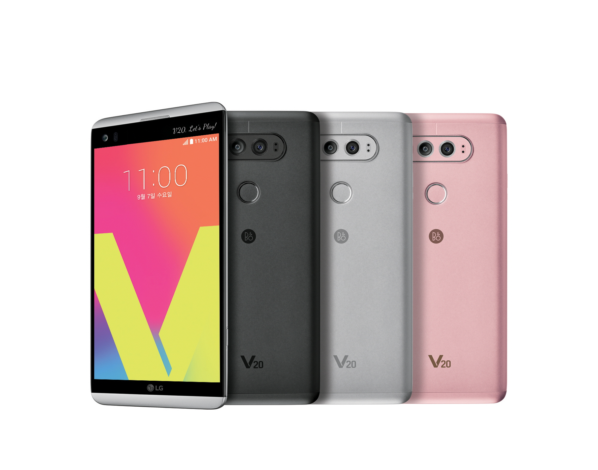 ■ 서울과 샌프란시스코에서 7일 동시 공개행사 □ 이달 말 한국 출시를 시작으로 글로벌 시장 순차 공급 ■ ‘쿼드 DAC’과 ‘B&O’의 만남… 섬세하고 깨끗한 원음의 감동 전달 □ 세계 최초 ‘32비트 하이파이 쿼드 DAC’ 탑재 스마트폰 □ ‘B&O 플레이’와 함께 튜닝한 세계 최고 수준 오디오 기능 탑재 ■ CD 음질 보다 6.5배 뛰어난 ‘24비트 하이파이 녹음’ 가능 □ 오디오 녹음앱: ‘기본’, ‘콘서트’, ‘사용자 설정’ 등 사용 환경에 따라 선택 □ 자신만의 음원 제작이 가능한 ‘스튜디오 모드’ 기능: 미리 녹음된 반주에 자신의 노래나 악기연주를 더해 녹음 ■ 전문가가 찍은 것 같은 흔들림 없는 동영상 촬영 가능 □ 흔들림 보정 기능: 전자식 손떨림 방지(EIS) + 디지털 이미지 보정(DIS) □ ‘비디오 전문가 모드’에 ‘하이파이 비디오 레코딩 기능’ 추가: 시냇물 소리, 발자국 소리 등 현장의 세세한 소리까지 24비트로 담아 ■ 세계 최초 전?후면 광각 카메라 탑재 □ 후면 135도, 전면 120도 광각 카메라 탑재 □ ‘하이브리드 오토 포커스’ 탑재, 세 가지 포커스 방식으로 동시 측정 ■ ‘세컨드 스크린’ 등 멀티미디어 기능 강화한 사용자 경험(UX) 제공 □ 밝기 높이고, 글자크기 키워 시인성 개선한 ‘세컨드 스크린’ 탑재 □ 최신 ‘안드로이드 7.0 누가’ 기반의 UX로 사용 편의성 높여 ■ 견고함을 갖춘 실용적인 아름다움 □ 알루미늄 소재의 후면 배터리 커버 □ 상?하단에 충격에 강한 ‘실리콘-폴리카보네이트’ 사용 ※ Social LG전자 ( 에서 관련 보도자료를 확인하실 수 있습니다.